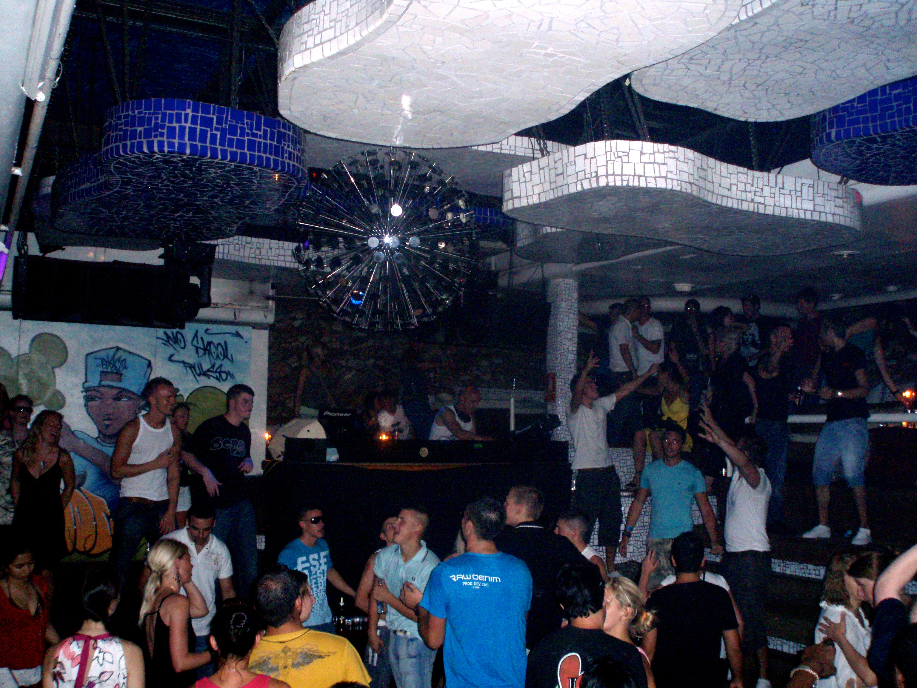 Pacha, Ibiza